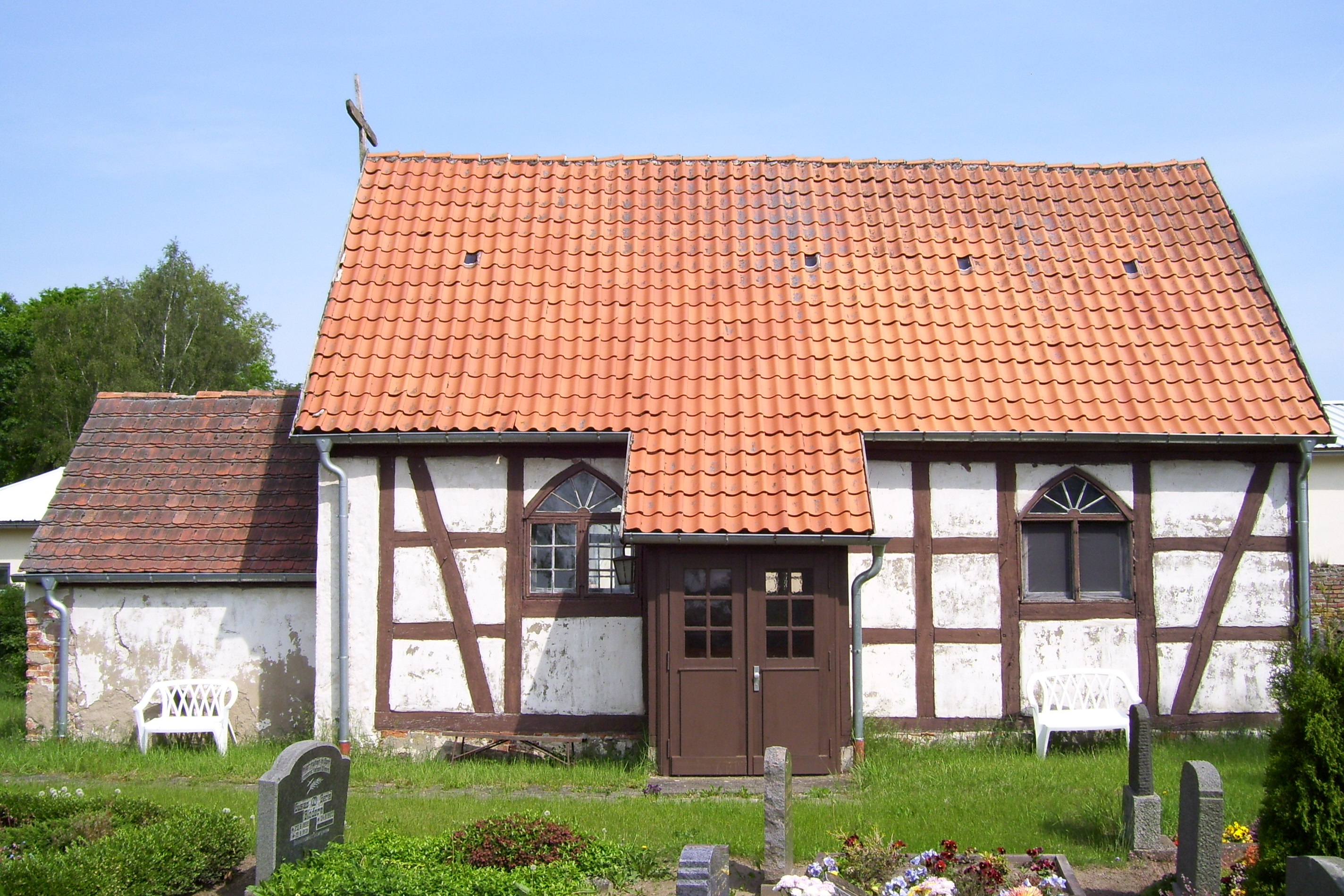 Kapelle Kuntzow - Landkreis Ostvorpommern Südseite